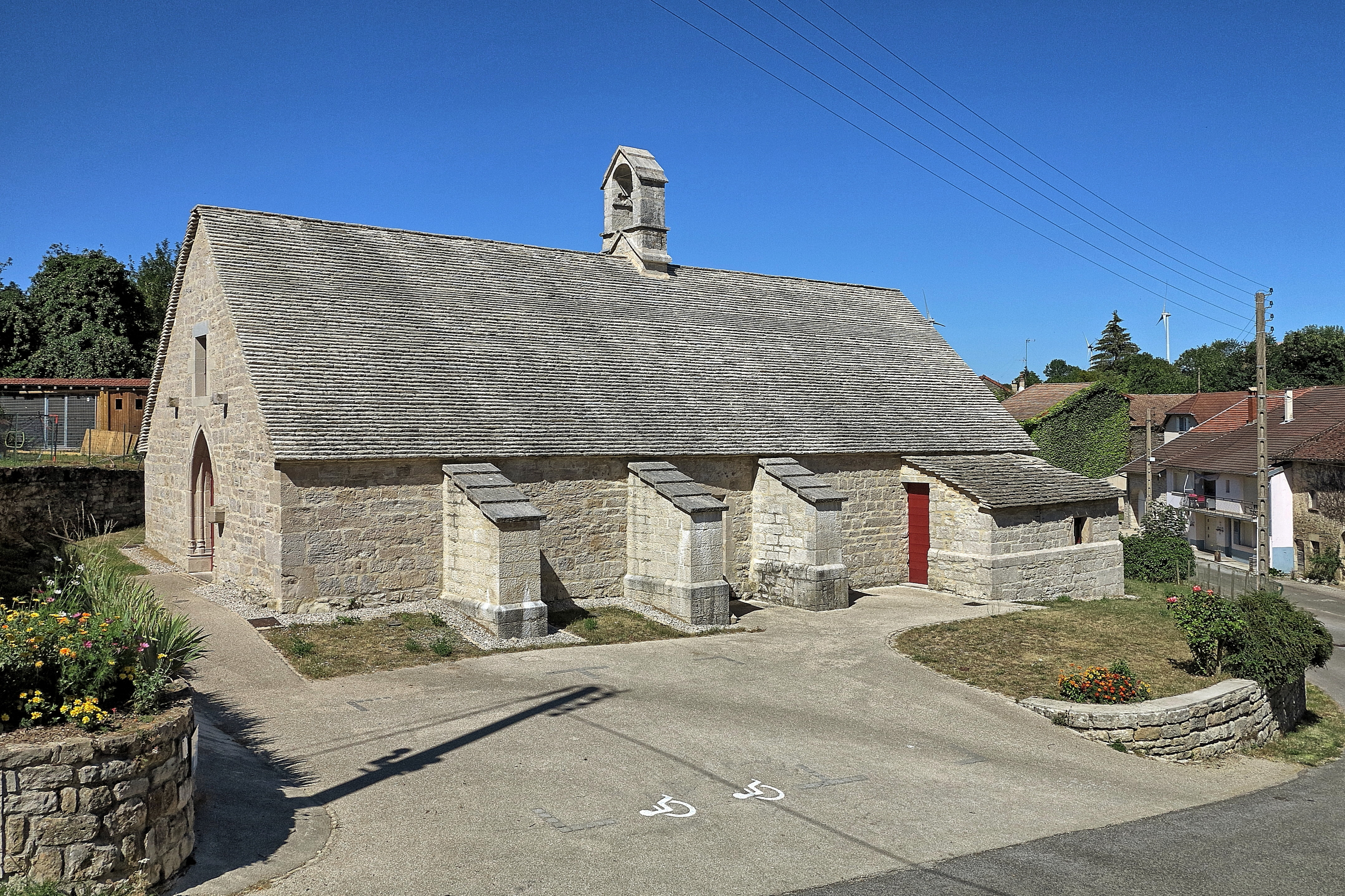 La chapelle du château de Chamole